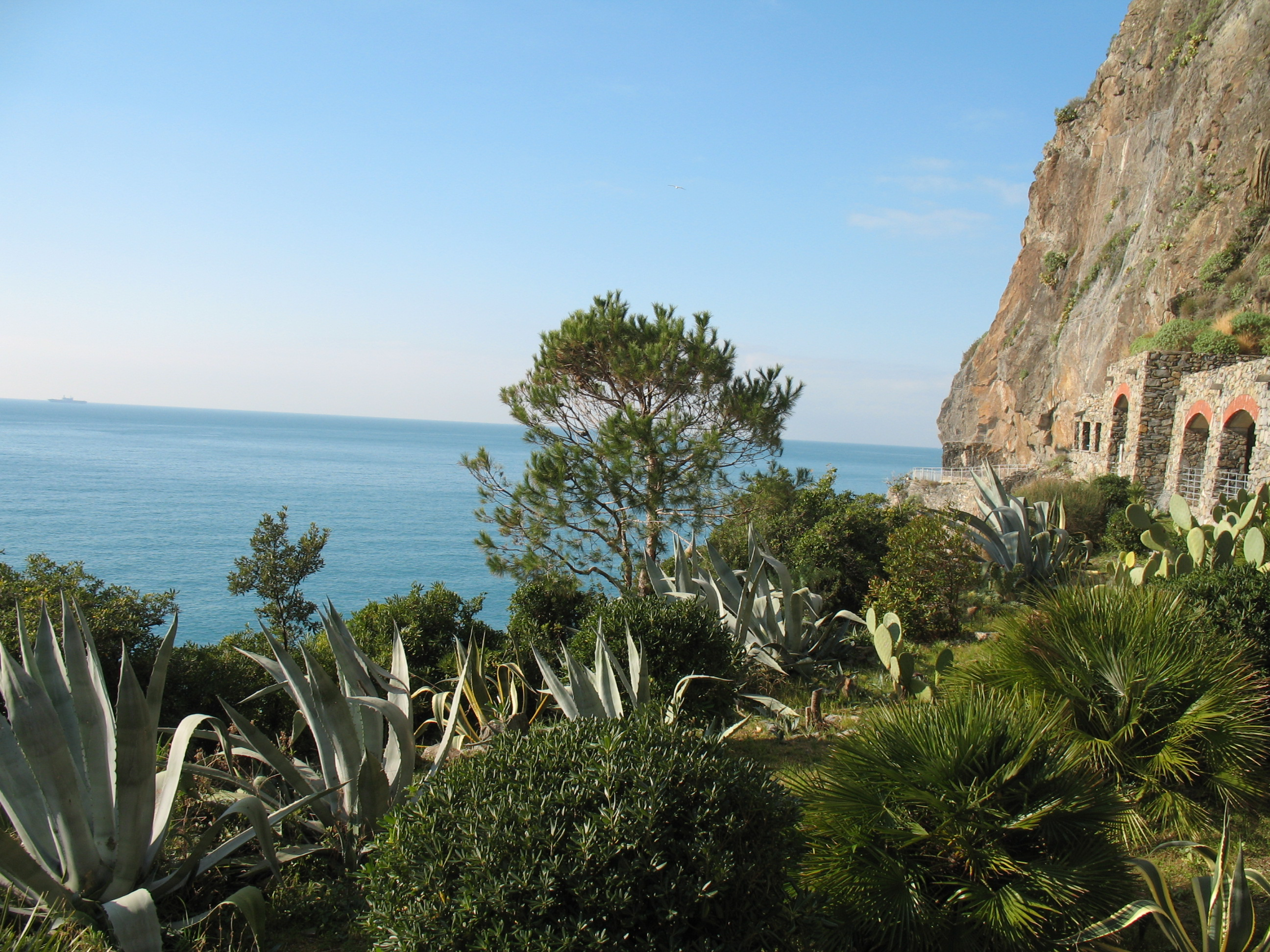 Immagine dalle Cinque Terre Via dell'Amore